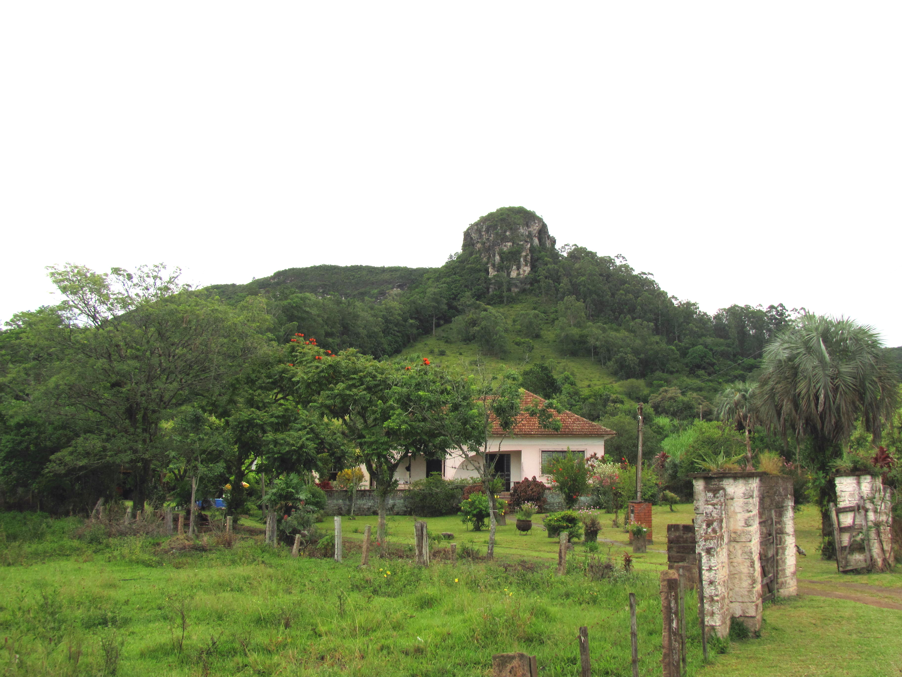 Pico do Itacolomi em Gravataí